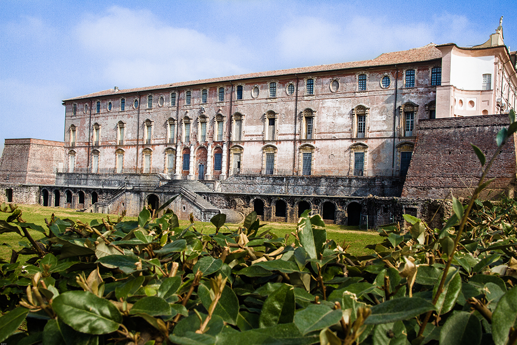 Parco Ducale - MIBAC This is a photo of a monument which is part of cultural heritage of Italy.